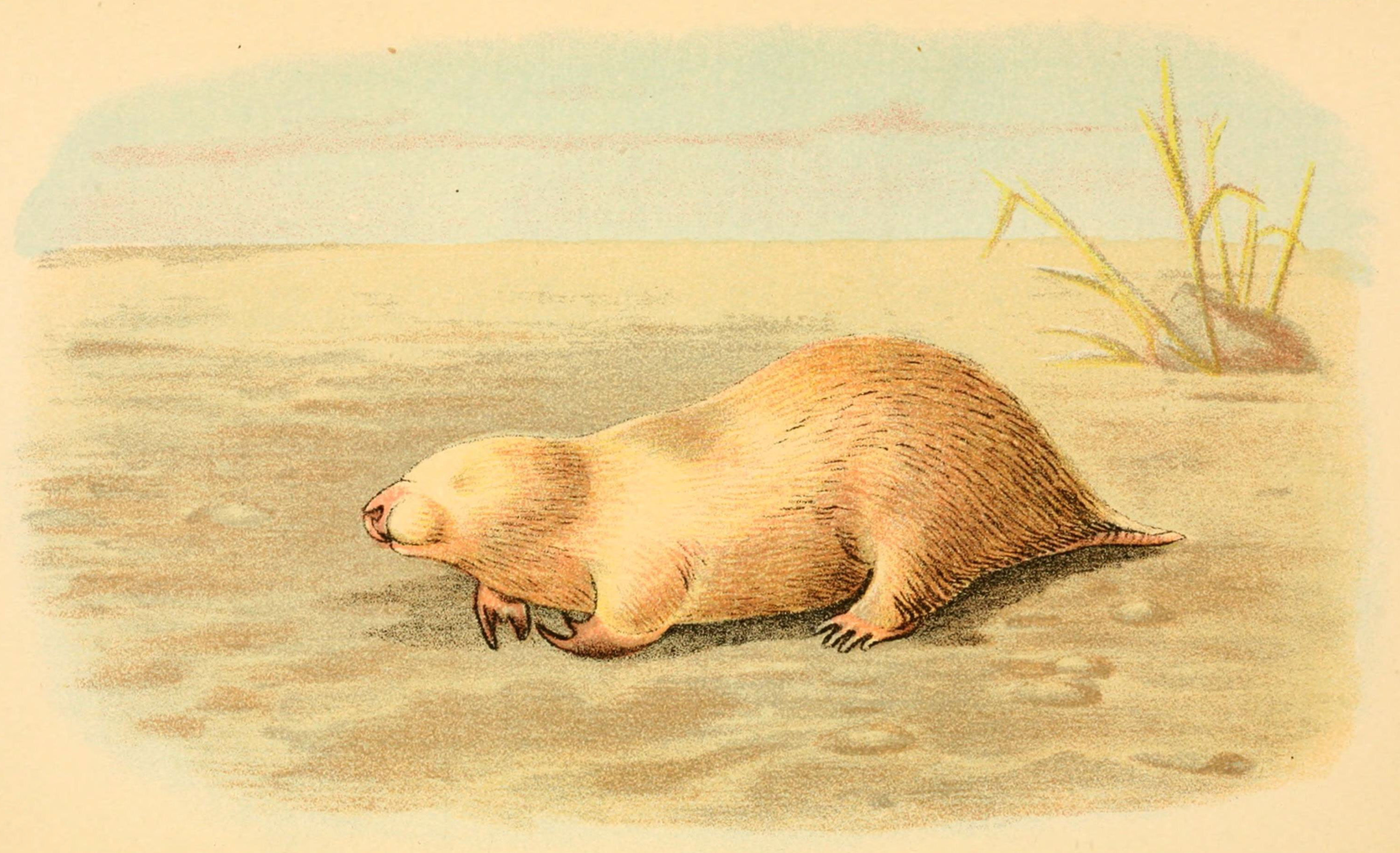 o Oh Pi